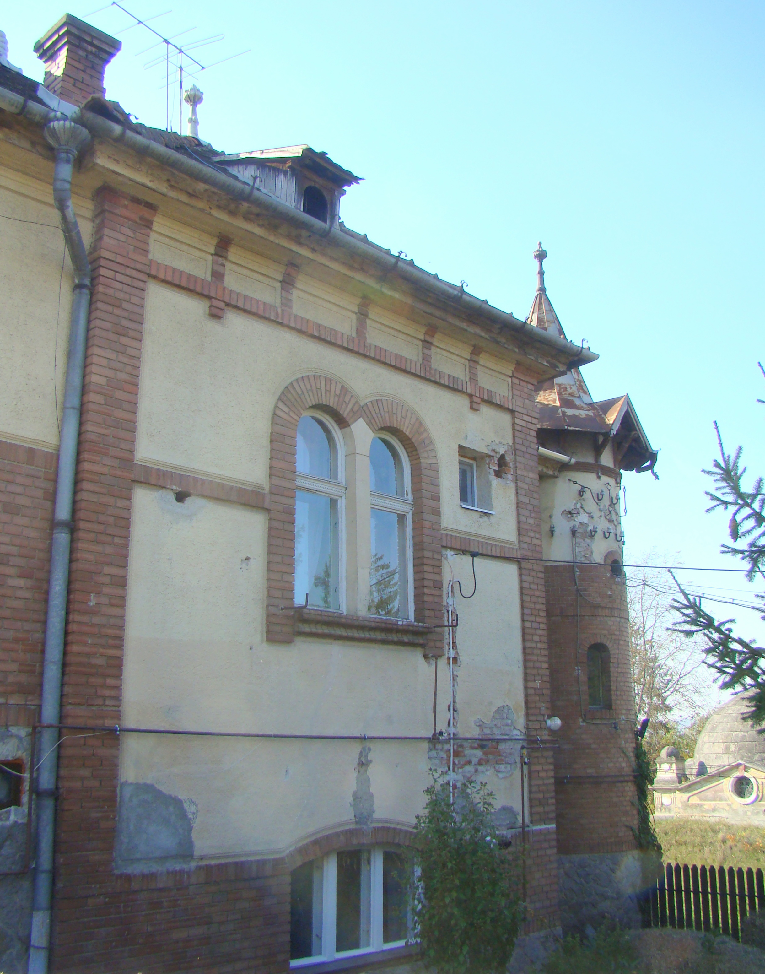 Uzina de apă și parcul, municipiul Târgu Mureș, str. Verii 4 1908 - 1909